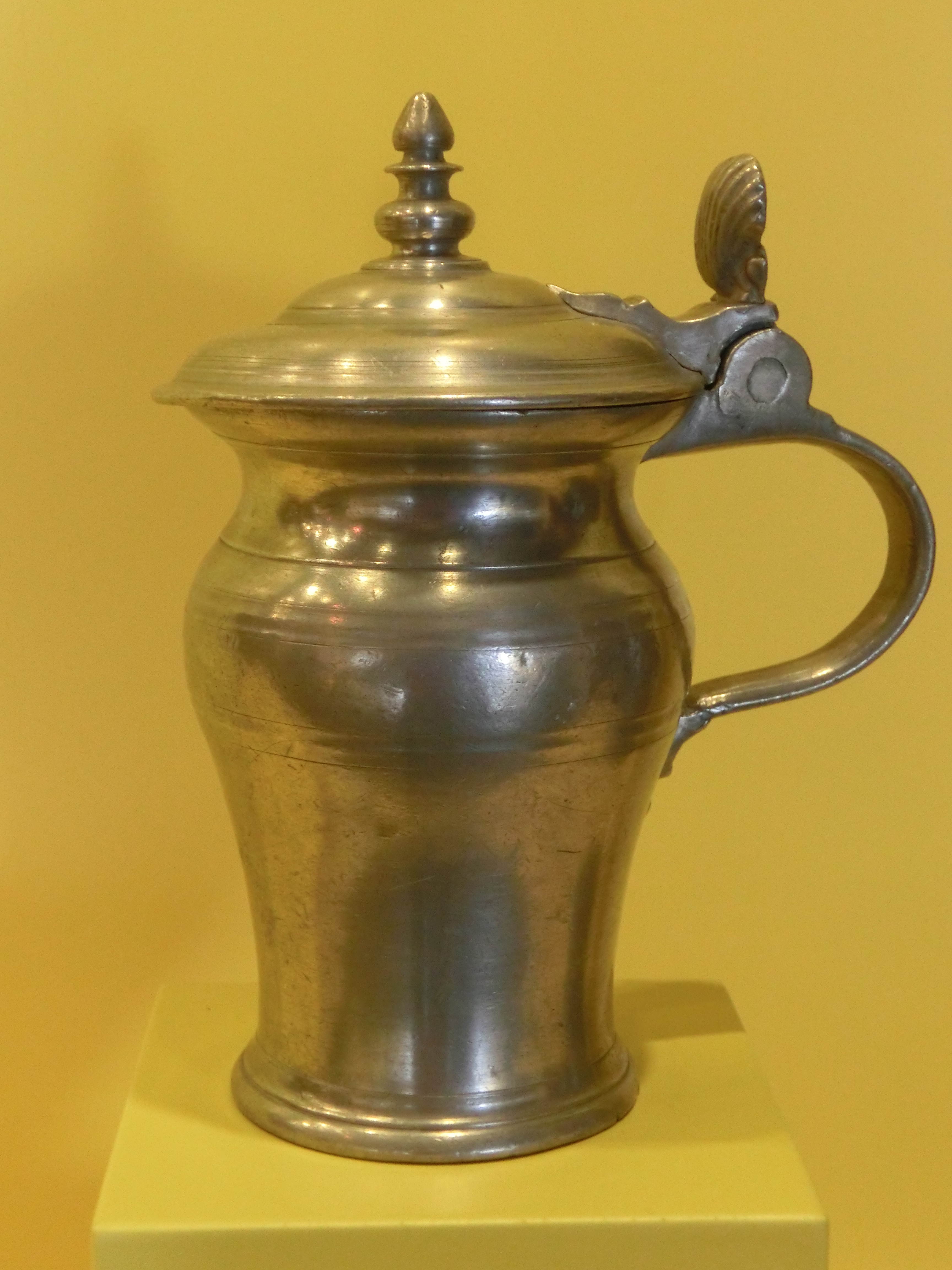 Deutschland - Baden-Württemberg - Ulm: Hefekännchen von Meister Stephan Schelling (Ulm, Zinn, um 1750) im Museum für Brotkultur, Ulm